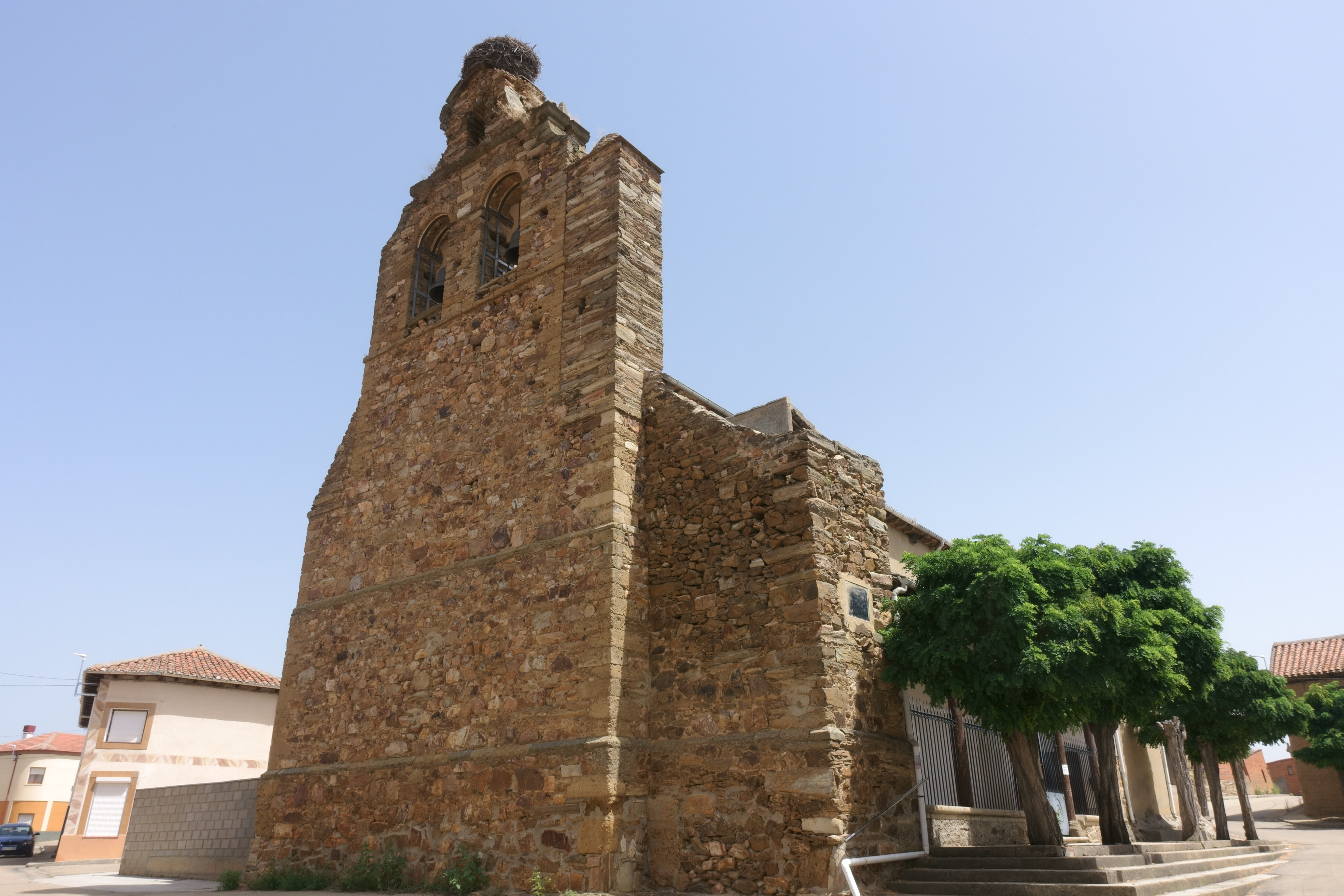 Iglesia de San Adrián, en San Adrián del Valle (León, España).